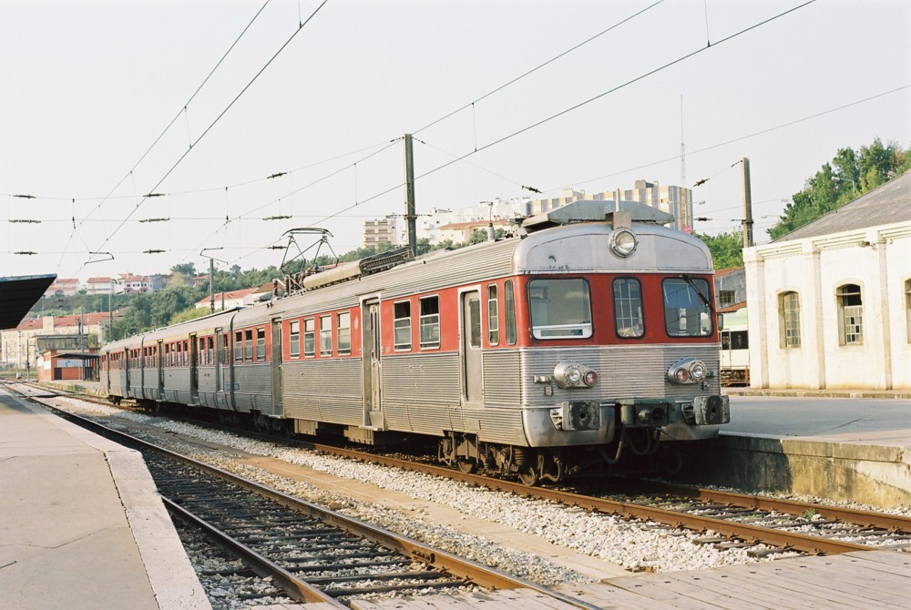 La 2058 en Coïmbra-B